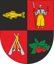 Герб села Яськи, Біляївський район, Одеська область